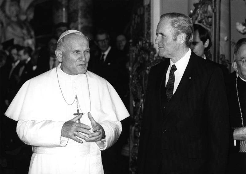 Vom 15. bis 19. November 1980 besuchte Seine Heiligkeit Papst Johannes Paul II. die Bundesrepublik Deutschland. Auf Einladung von Bundespräsident Karl Carstens hat der Papst seinen pastoralen Besuch mit einem offiziellen in Bonn verbunden. Am 15. November gab der Bundespräsident einen Empfang zu Ehren Seiner Heiligkeit auf Schloß Augustusburg in Brühl bei Bonn. Dort führte Papst Johannes Paul II. auch ein Gespräch mit Bundeskanzler Helmut Schmidt. Gleichzeitig traf Bundesaußenminister Hans-Dietrich Genscher mit Kardinal-Staatssekretär Casaroli zusammen. Im Anschluß an den offiziellen Teil begab sich der Papst auf den Bonner Münsterplatz, um dort eine Ansprache zu halten. Ferner bestand der pastorale Teil aus Besuchen in Köln, Osnabrück, Mainz, Fulda, Altötting und München. In allen diesen Städten hielt Papst Johannes Paul II. die Heilige Messe. Eigentlicher Anlaß seines Aufenthaltes in der Bundesrepublik war der 700. Todestag von Albertus Magnus (1193-1280), dessen Grab der Papst in Köln besuchte. Bundespräsident Karl Carstens und Papst Johannes Paul II. auf Schloß Augustusburg in Brühl.